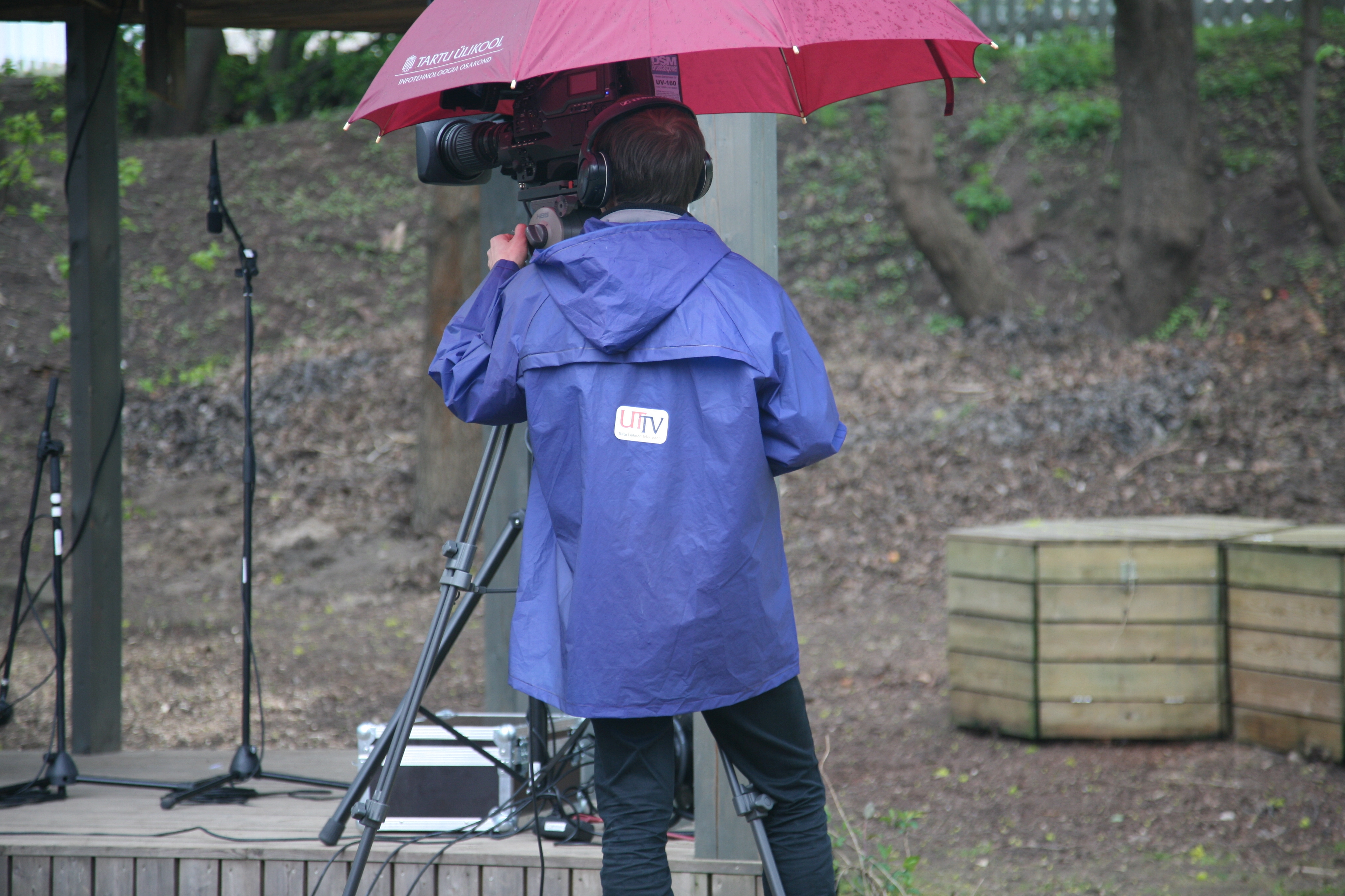 UTTV operaator Prima Vista 2015 avamisel